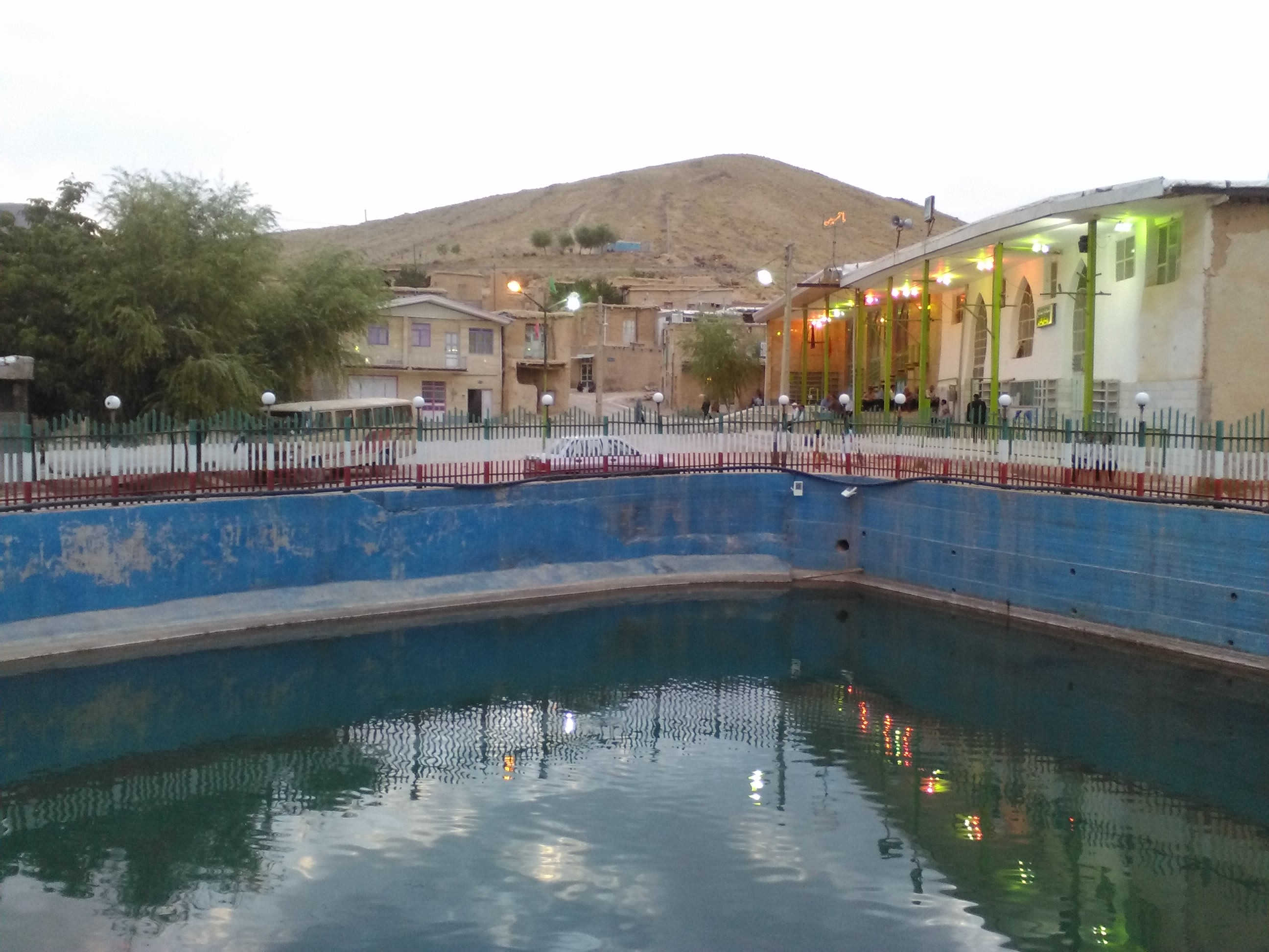 روستای لکان